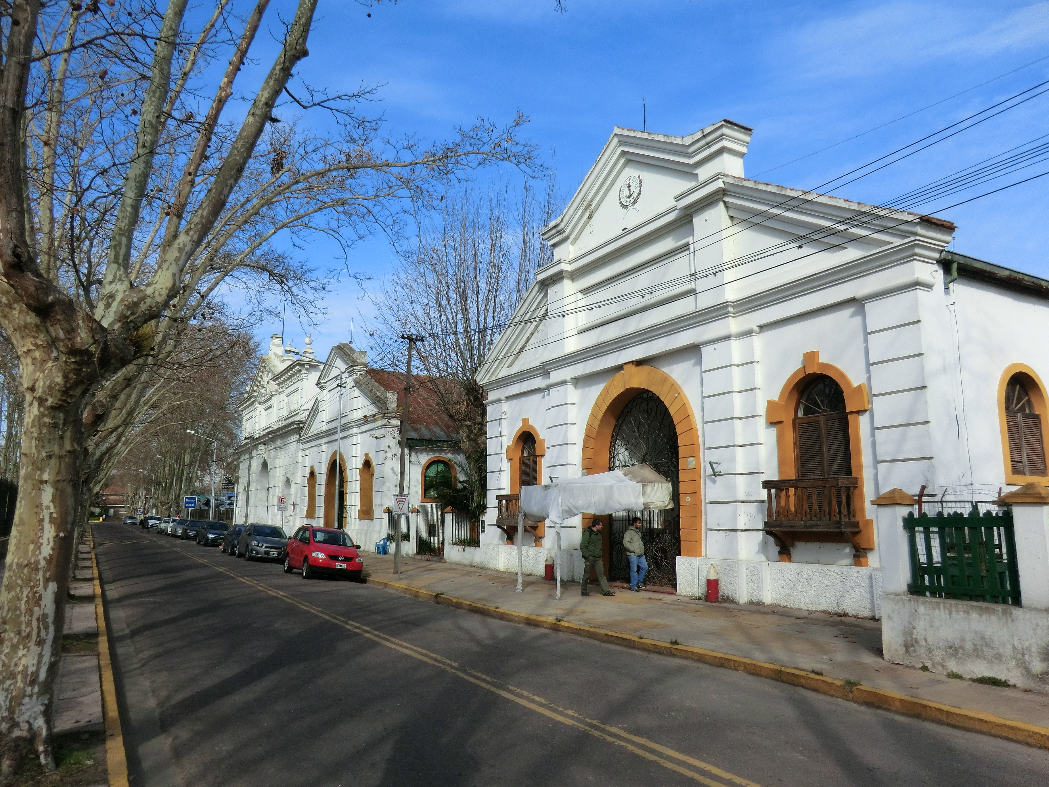 Museo Naval Argentino